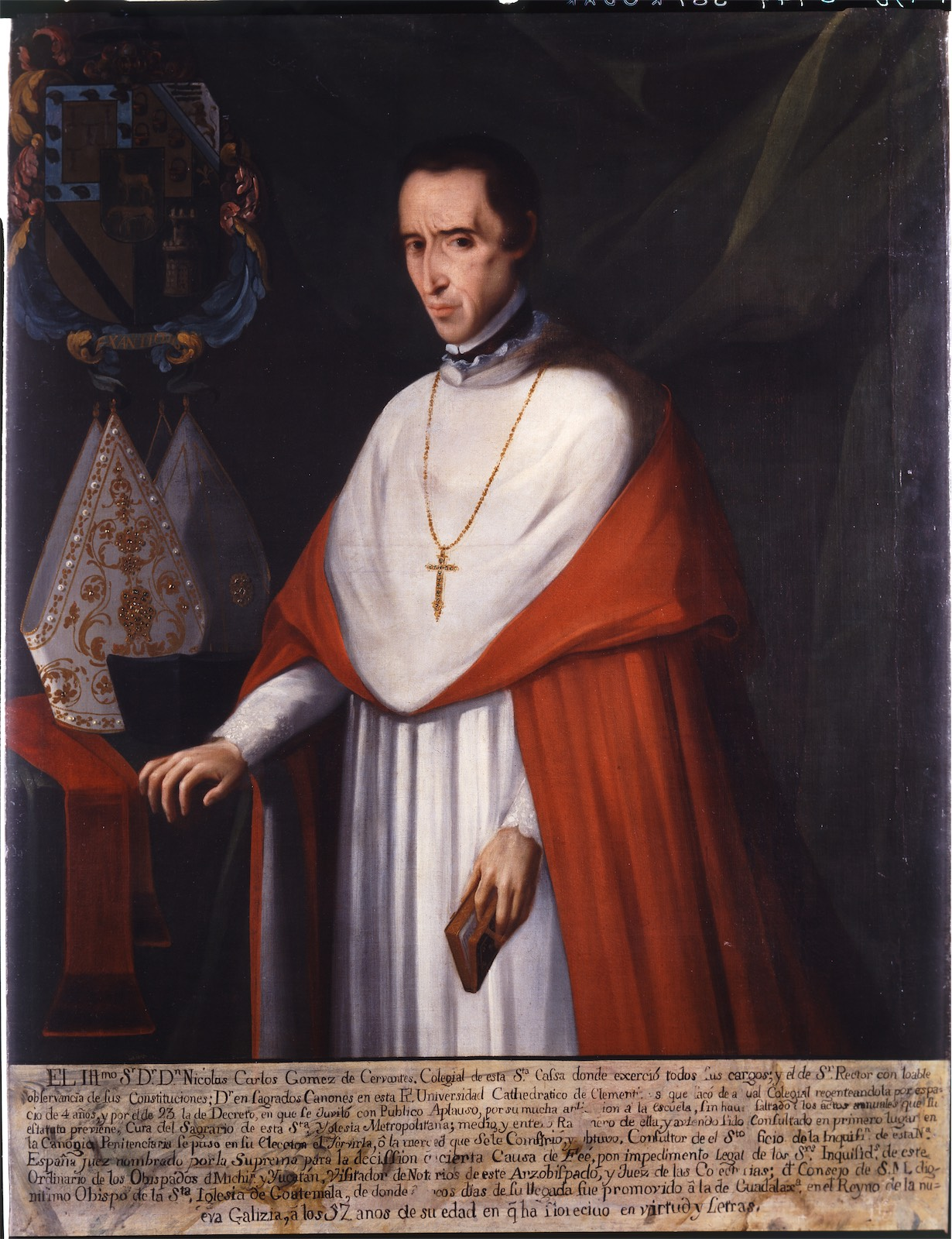 Retrato de Nicolás Carlos Gómez de Cervantes, Óleo sobre tela, Museo Nacional del Virreinato.